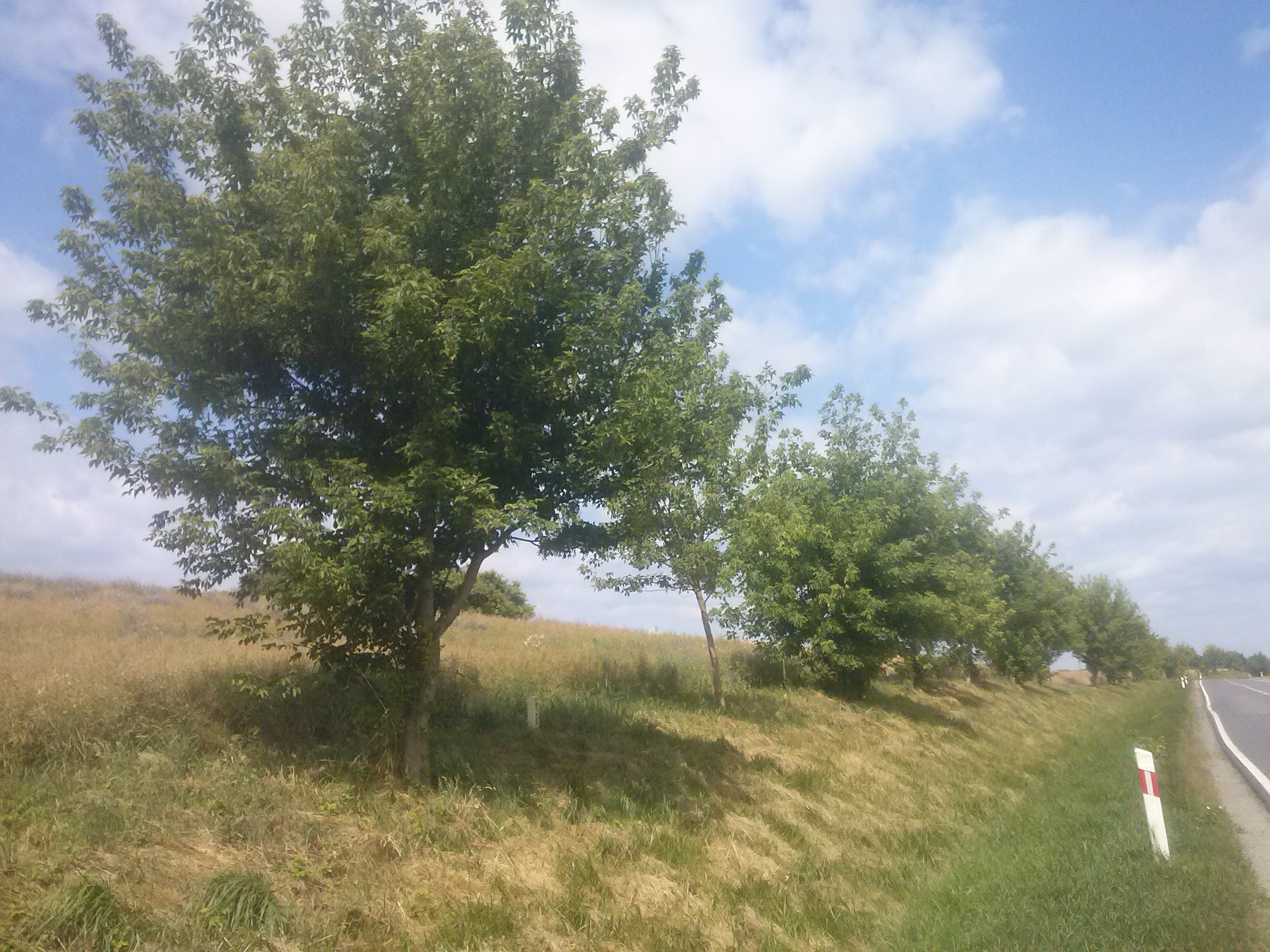 Kilkudziesięciu-metrowa jednostronna aleja Kłokoczkowa przy drodze krajowej nr 77, z Dębna do Wierzawic